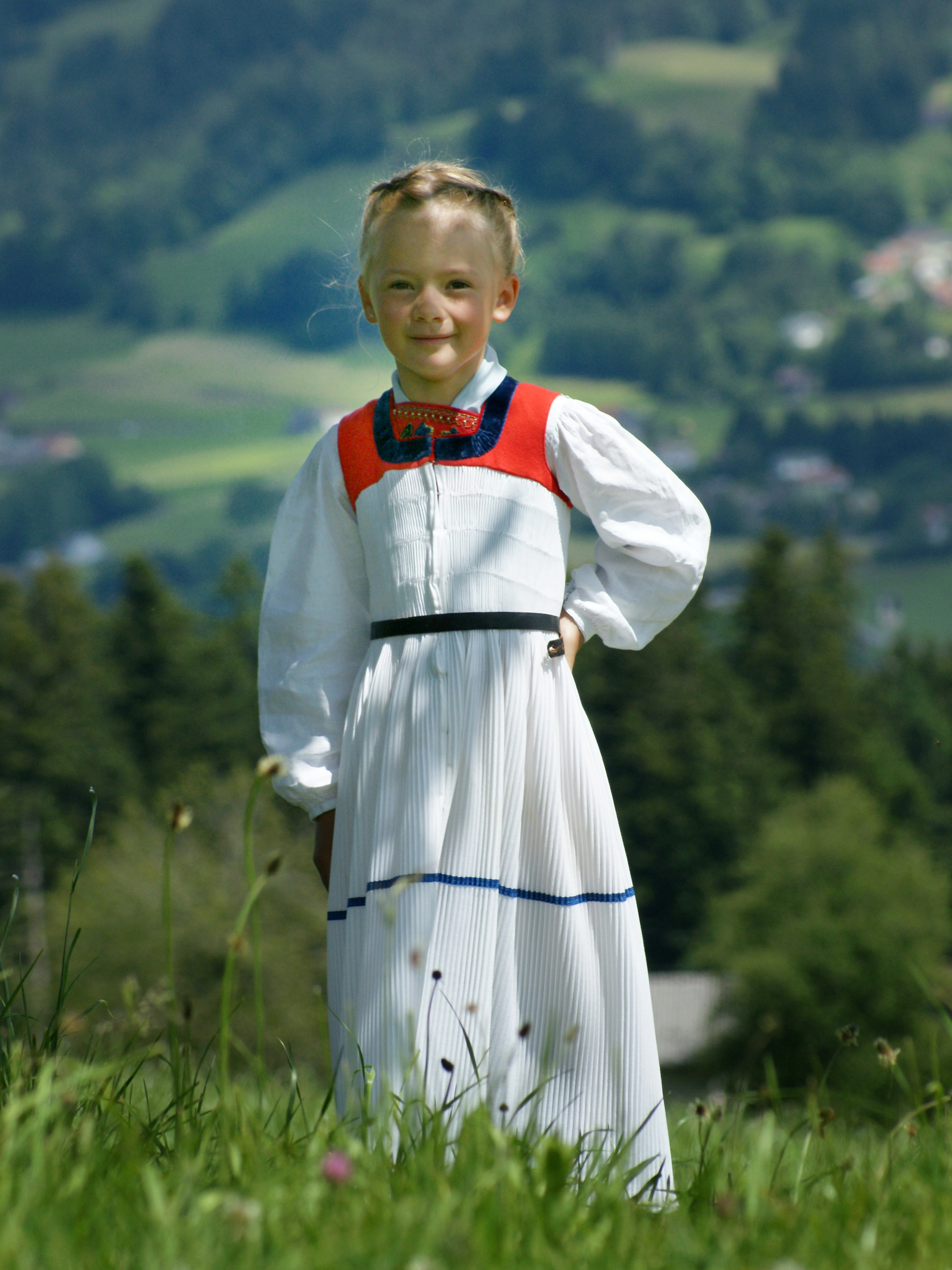 Die Merkmale der Bregenzerwälder Frauentracht (der Juppe) sind, die silberne Schnalle, der "Bleotz", welcher kunstvoll mit gold-silbernen Stickereinen versehen ist, der "Keadoro", ein kunstvoll goldsilberner bestickter Zierstreifen am Rücken und die verschiedenen Kopfbedeckungen. Sie sind ein ganz besonderes Markenzeichen der Wäldertracht. "Spitzkappe (für den Kirchgang)", "Brämokappo (Pezlkappe aus Seehundfell)", "Stuoz", "Stucho (weisses Haartuch für die Trauer)", "Schäohut (Strohhut, Sommer)", "Kauffmannhut (Filzhut, Übergangszeit)" und als Meisterstück das "Schappale (Trachtenkrönele, Krönchen oder Flitterkrone)".